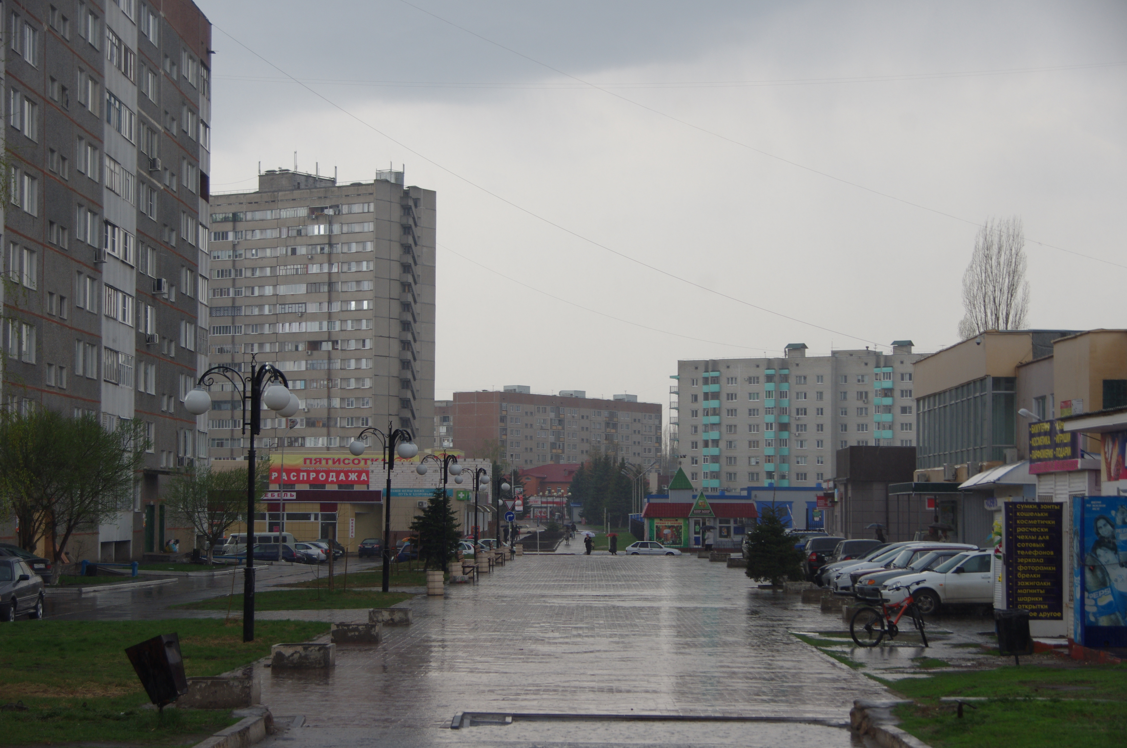 kurchatov 2013-04-28 0820